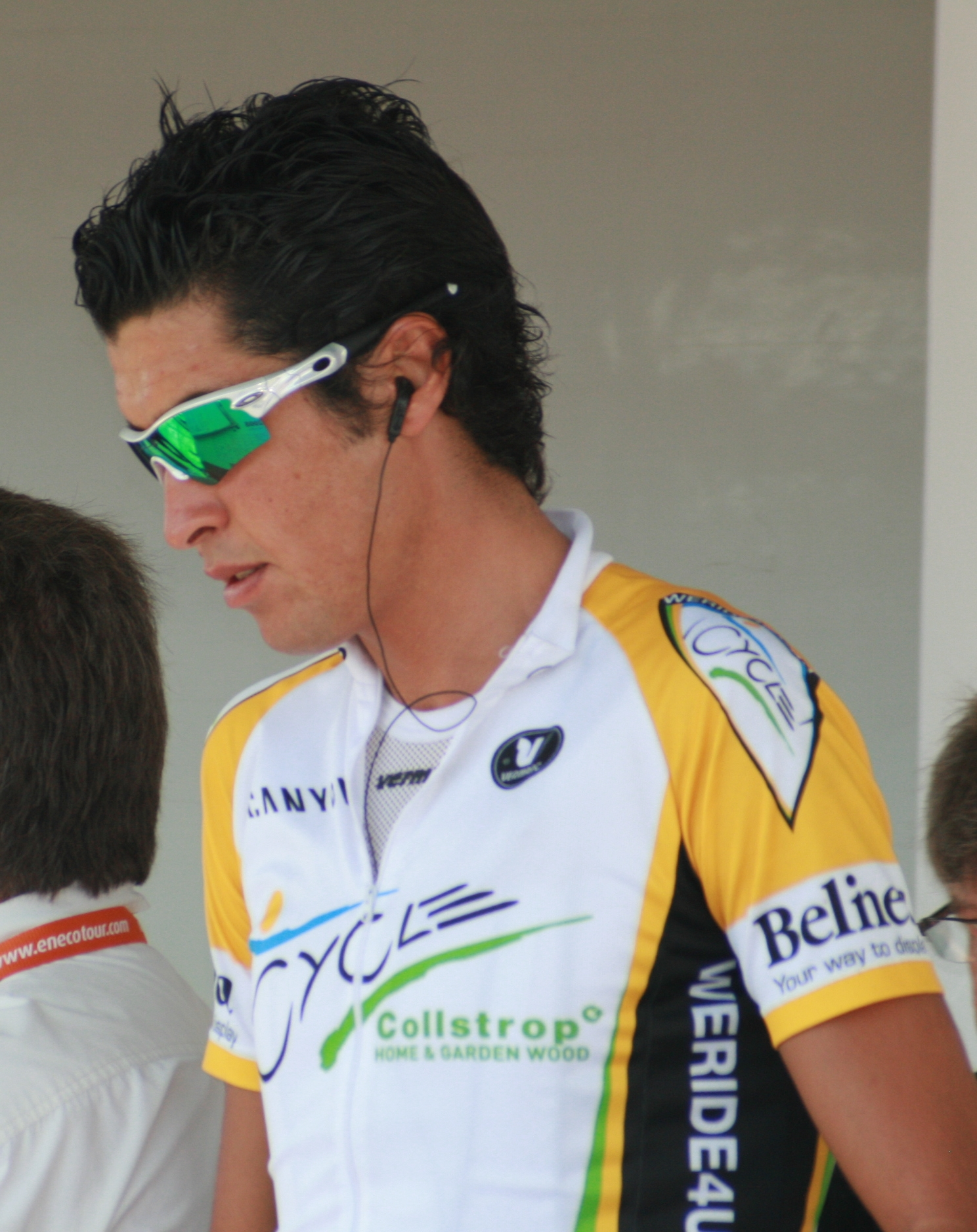 Mirko Selvaggi, à l'Eneco Tour 2008, à Ardooie